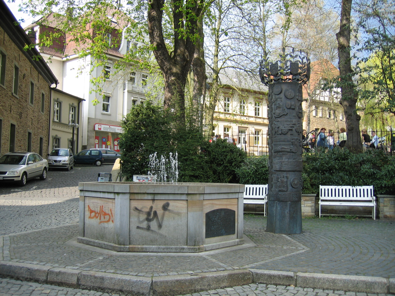 Description: Geschichtssäule mit Brunnen im Zentrum von Menden (Sauerland). Source: selbst fotografiert Date: 25. Apr. 2006 Author: Asio otus